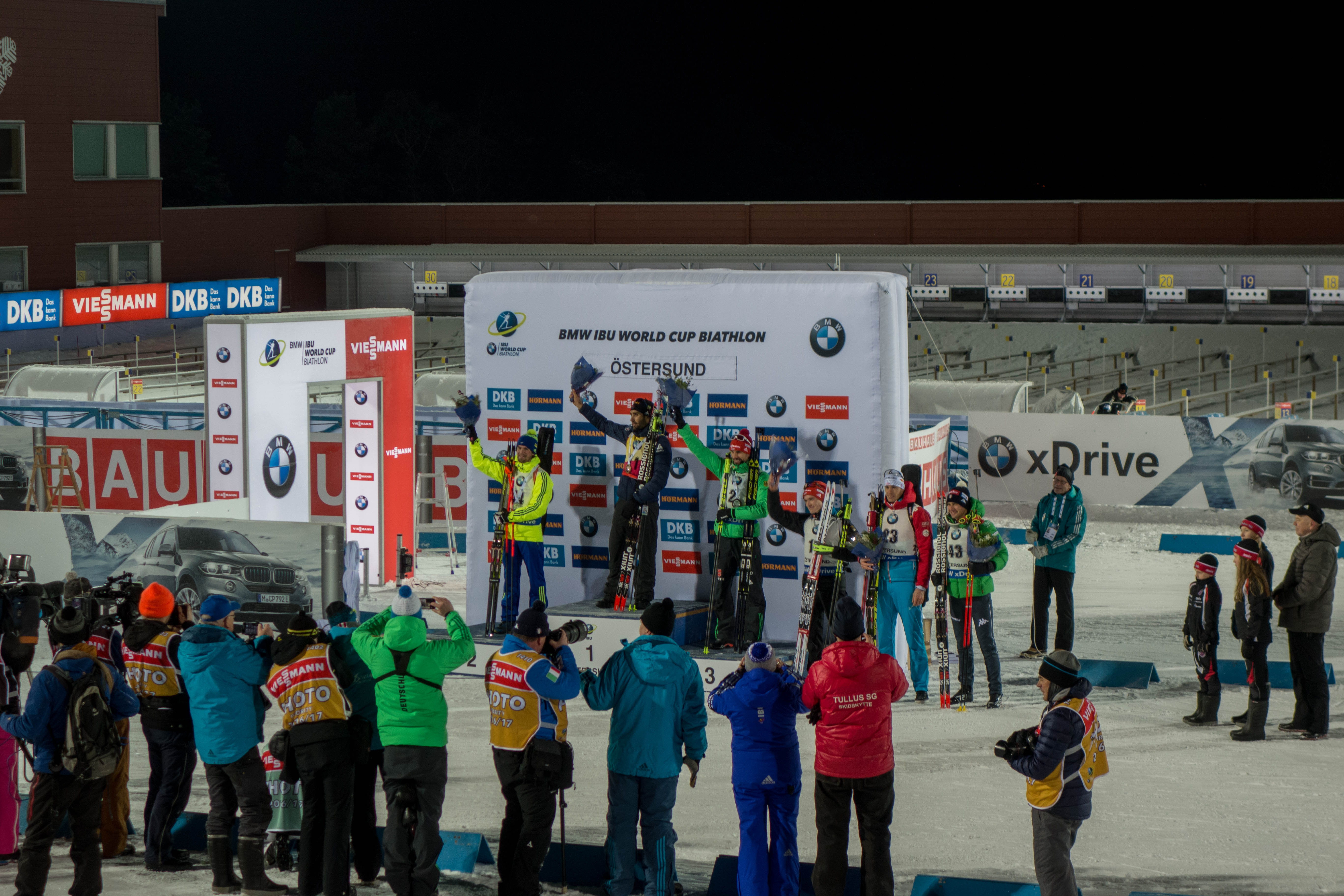 Prisceremoni efter herrarnas Sprintlopp vid Världscupen i Östersund 2016. Martin Fourcad Fredrik Lindström Arnd Peiffer